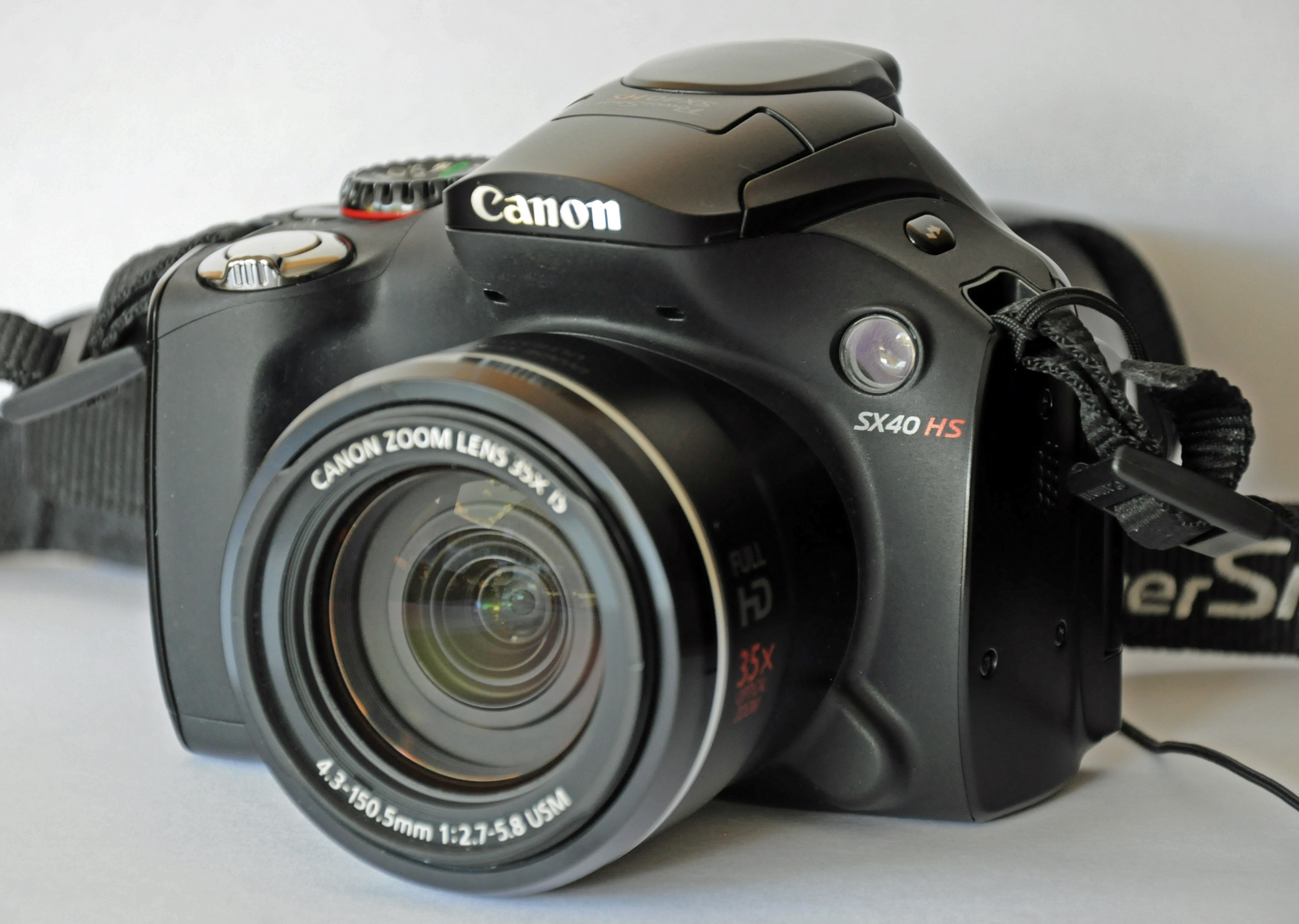 Die Canon PowerShot SX40 HS, Nachfolgemodell der SX30 HS.